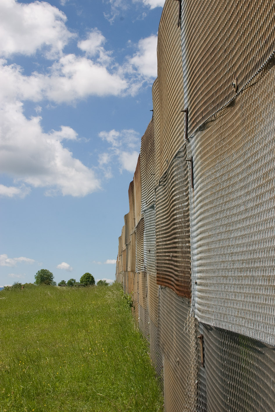 Streckmetallzaun Verwendet an der Innerdeutschen Grenze am Antifaschistischen Schutzwall.